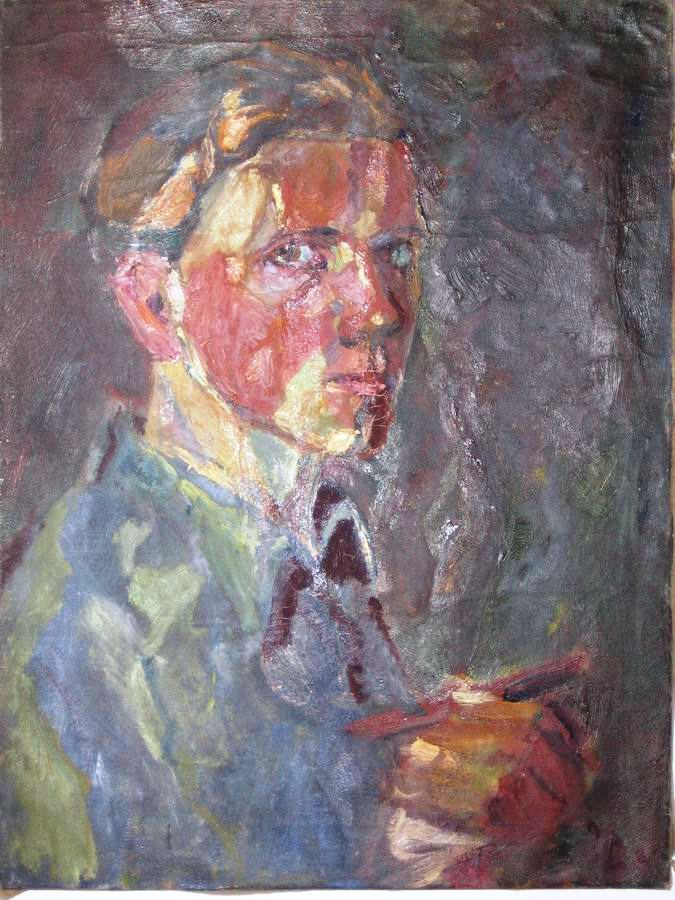 Self-portrait